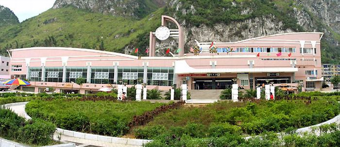 金城江火车站